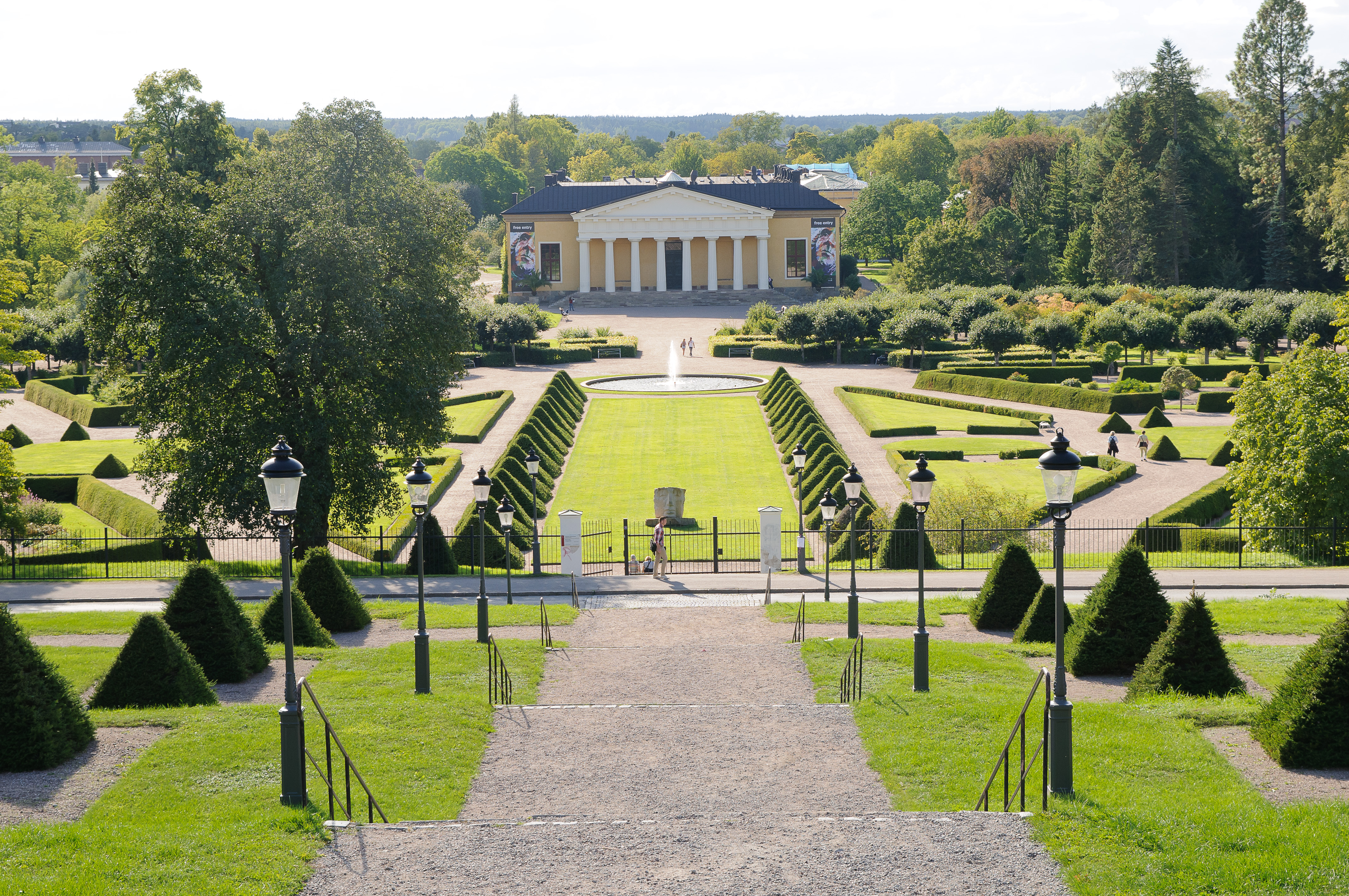 Baroque Botaniska trädgården i Uppsala — Svenska.